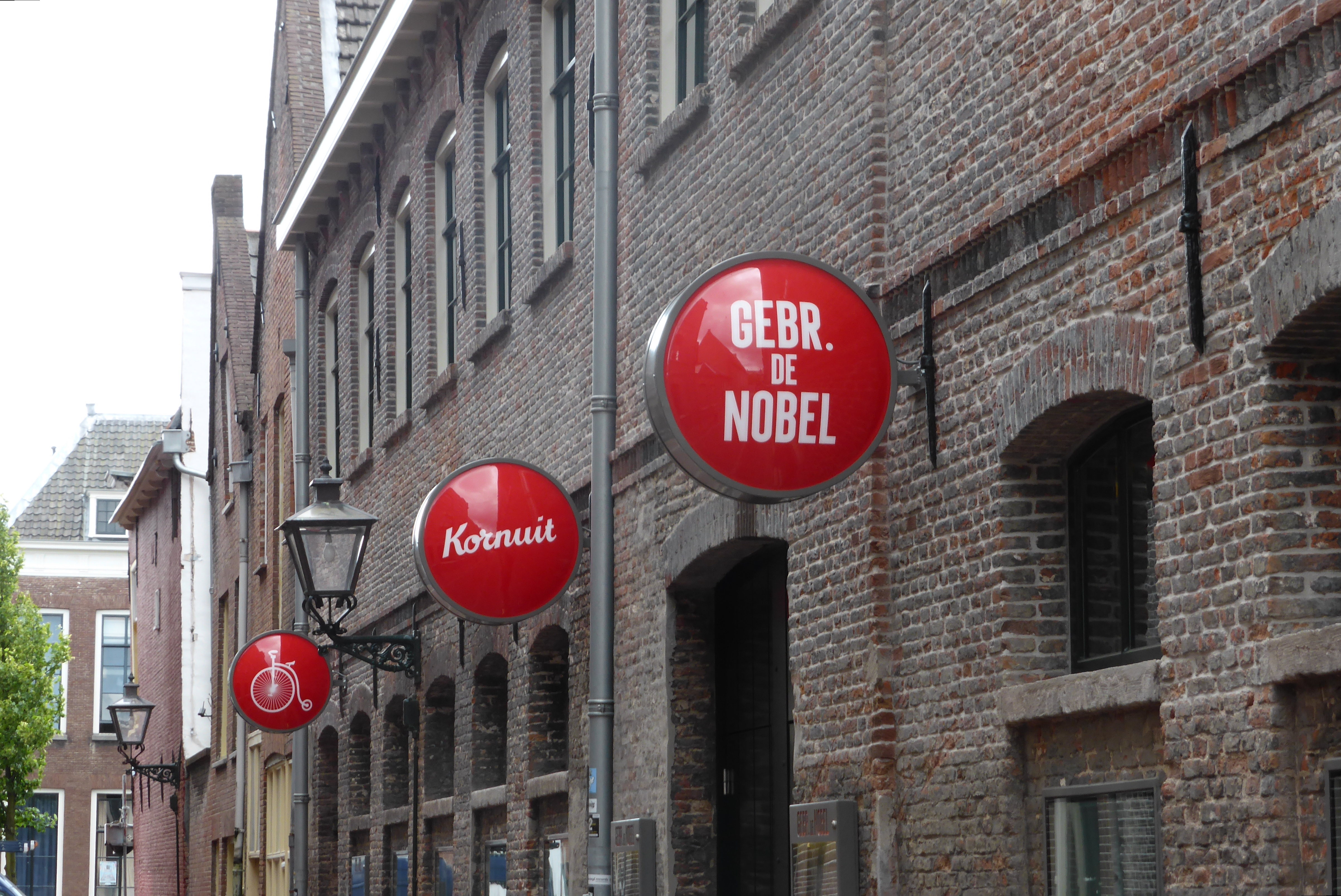 Gebre. de Nobel, Leiden